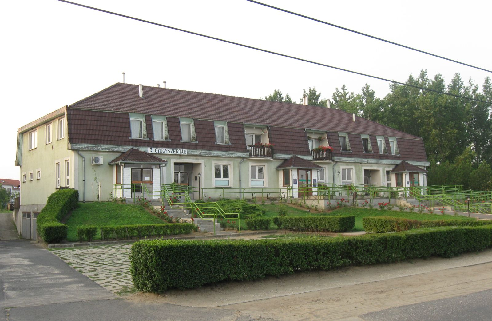 Egészségügyi központ épülete Szakolyban (Szabolcs-Szatmár-Bereg megye)